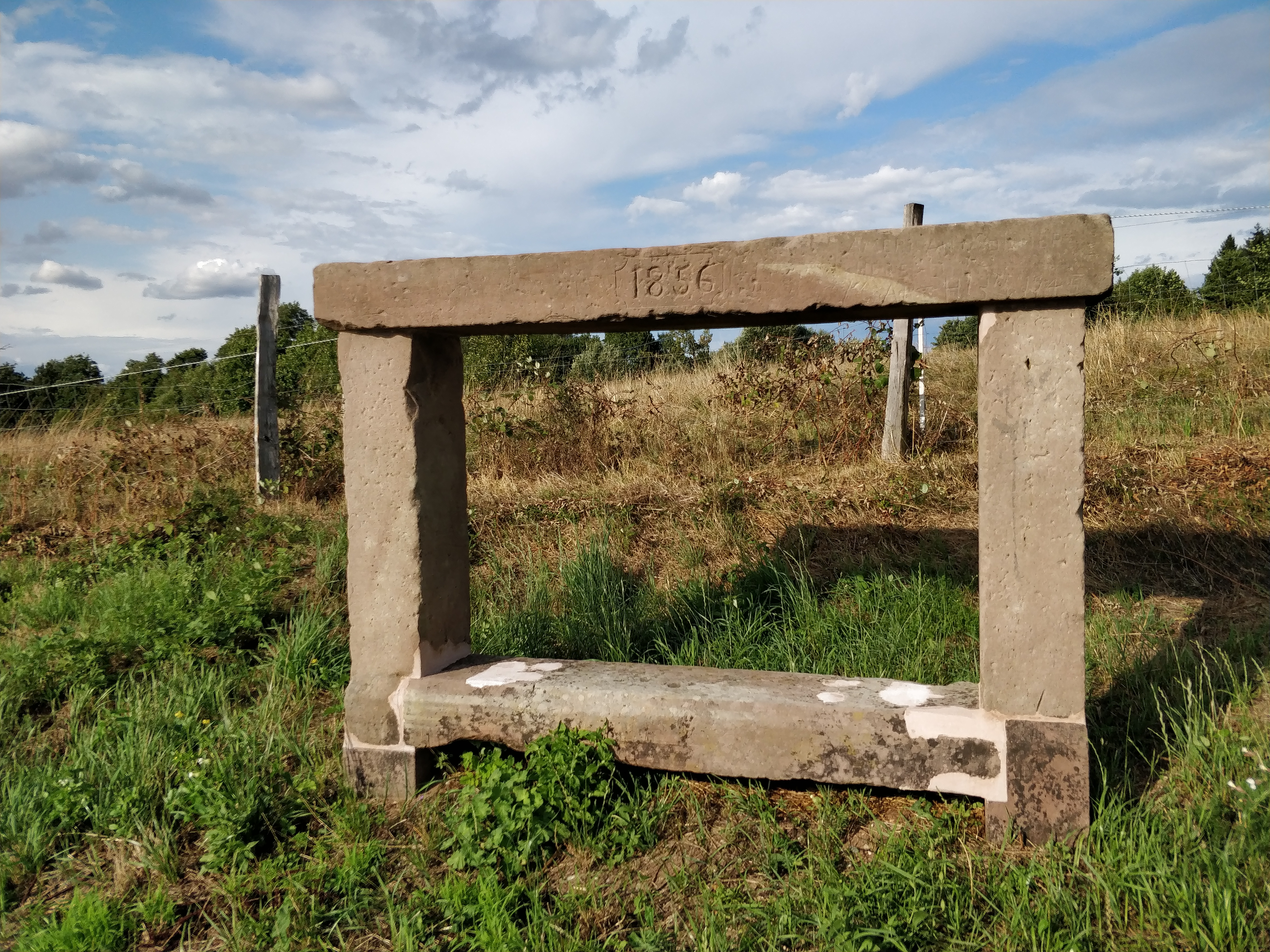 Banc reposoir napoléonien: .